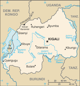 Mapa Rwandy.